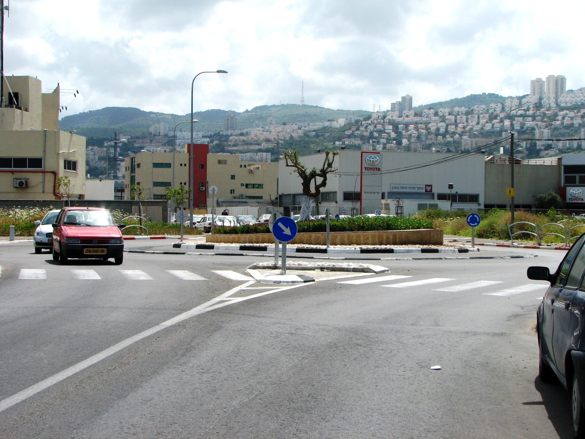 Check Post is the name of an industrial area - commercial planes in the Haifa Bay, which is included in the jurisdiction of the city of Haifa. Quarter domain between Route 4 west, the slopes of Caramel to the south, Highway 75 north of the Kishon River, the city Nesher to the east צ'ק פוסט הוא שמו של אזור תעשייתי-מסחרי מישורי במפרץ חיפה, הכלול בשטח השיפוט של העיר חיפה. הרובע תחום בין כביש 4 במערב, מורדות הכרמל מדרום, כביש 75 ונחל הקישון מצפון, והעיר נשר ממזרח. צומת באזור הצ'ק פוסט לאחר סיום שיפוץ בשנת 2009